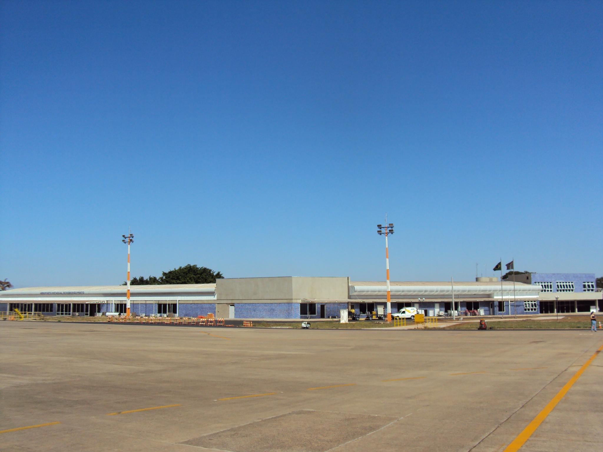 Novo Terminal Passageiros do Leite Lopes